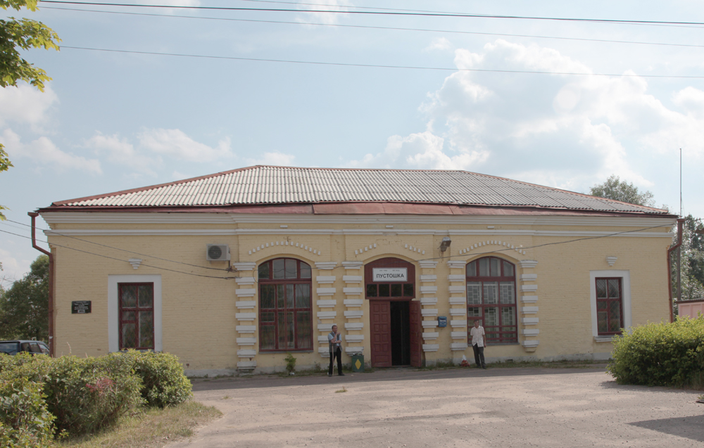 Задание вокзала станции Пустошка